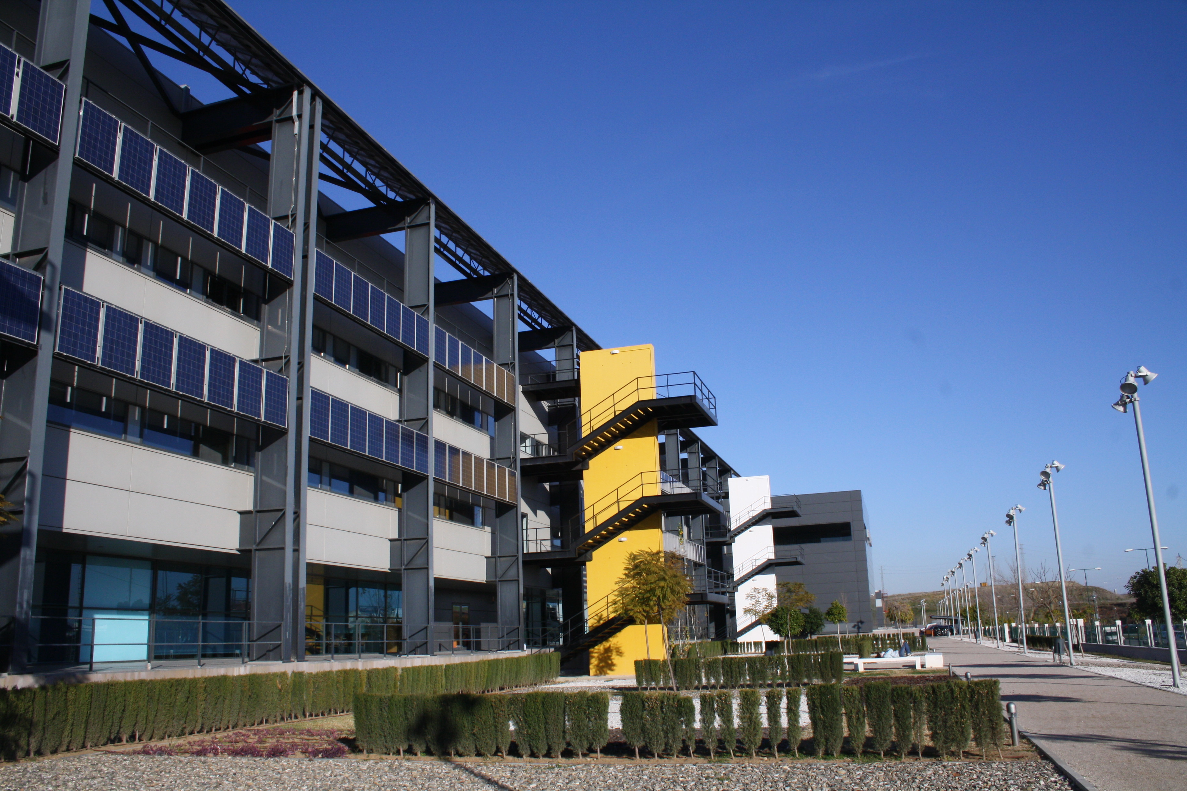 Ala oeste de la Escuela de Ingenierías de Málaga